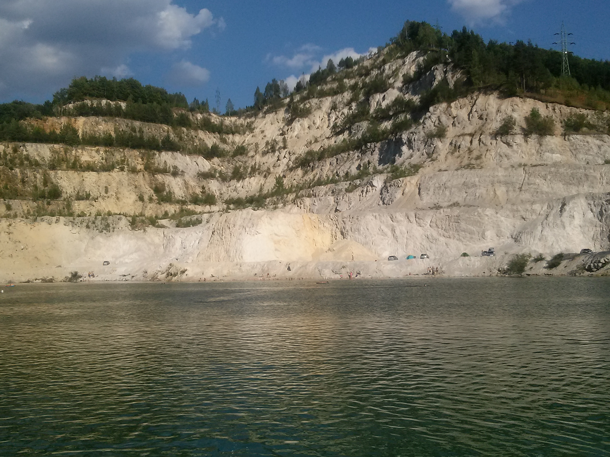 Zatopený lom "Šútovské jezero" v Kraľovanech-Riece u Šútova